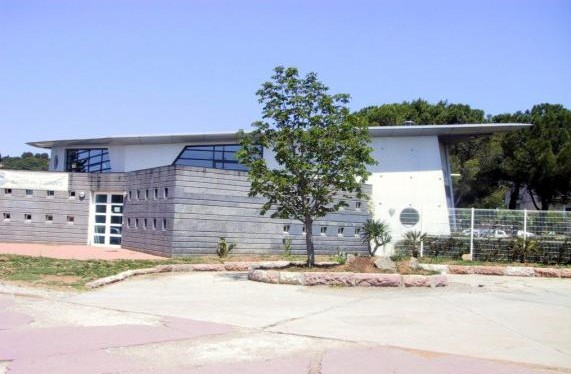 La Maison des Etudiants de l'Université Montpellier 2 (Place Eugène Bataillon) Image perso